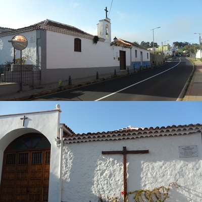 Parroquia San Miguel de Geneto, construida en 1707